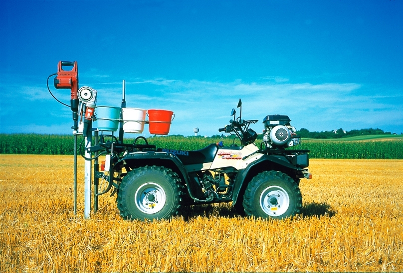 Bodenprobenahme mit Quad